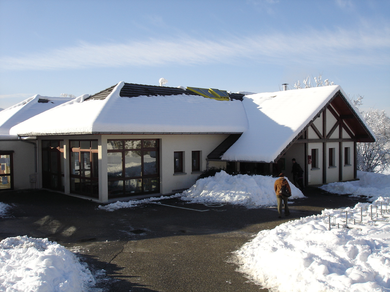 Le groupe scolaire sous la neige en 2008